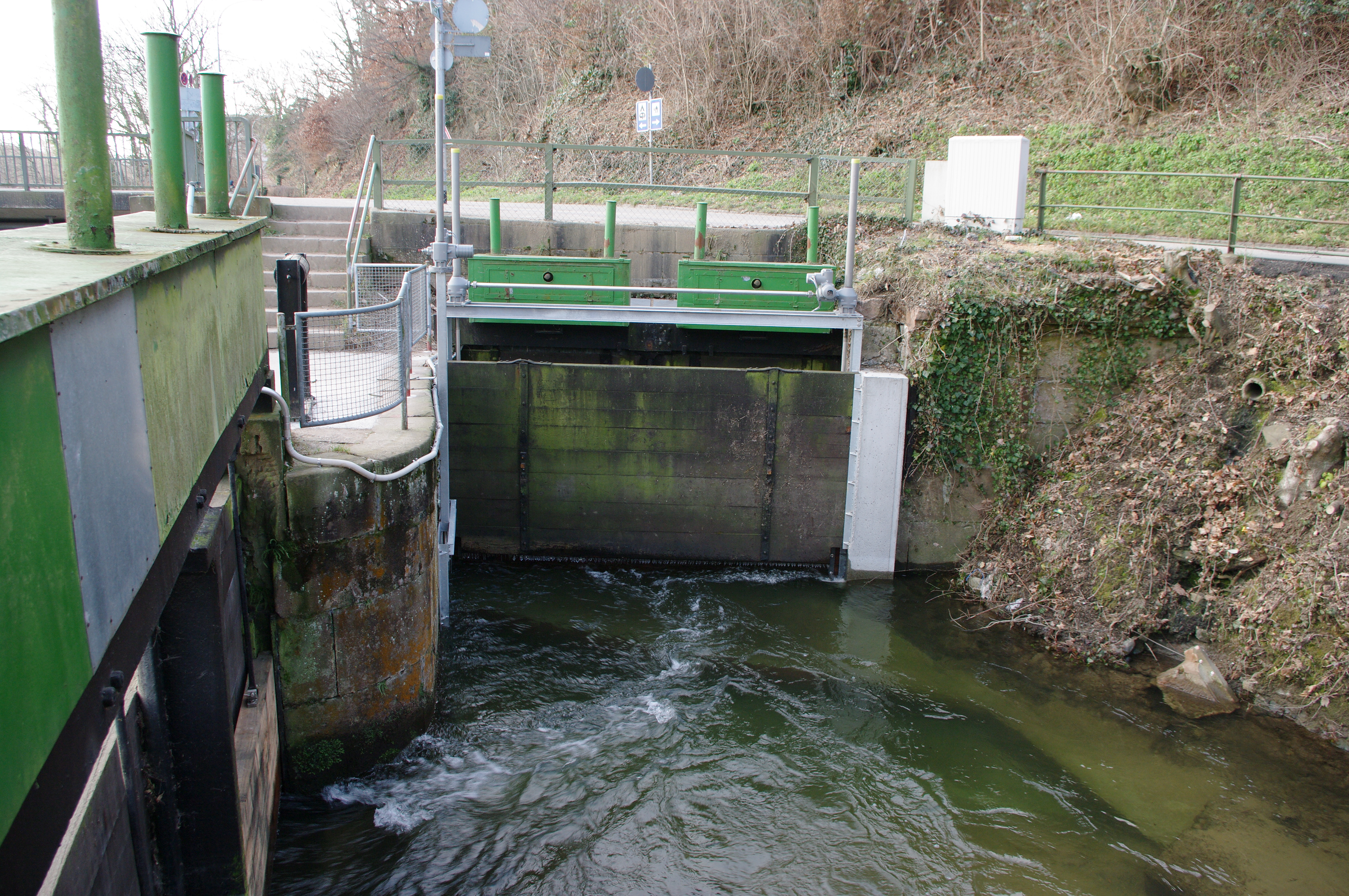 Hauptabsperrschieber des Kanals